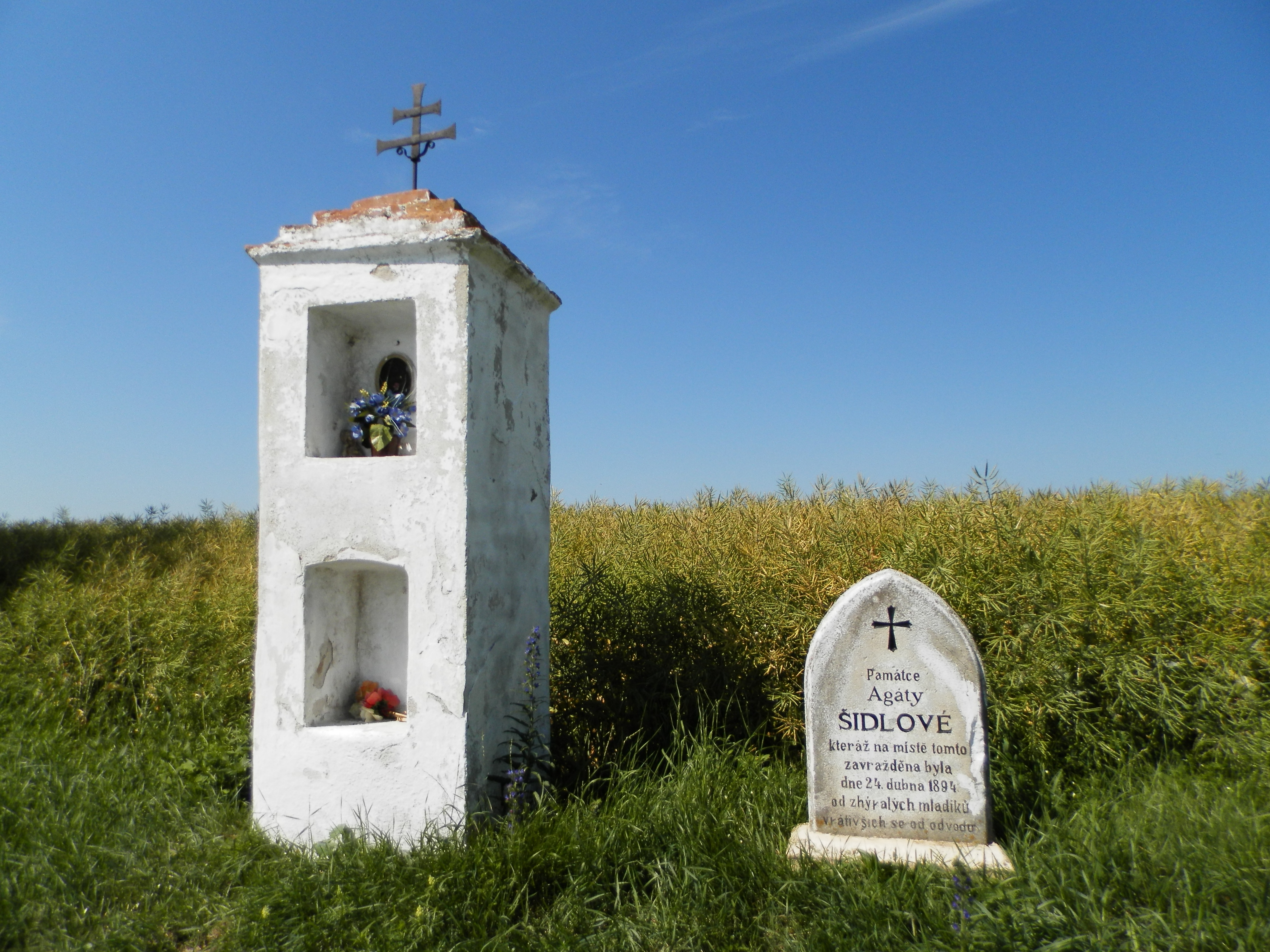 Boží muka (Petrovice), za obcí na křižovatce Debolice-Znojmo, Petrovice